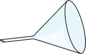 Entonnoir